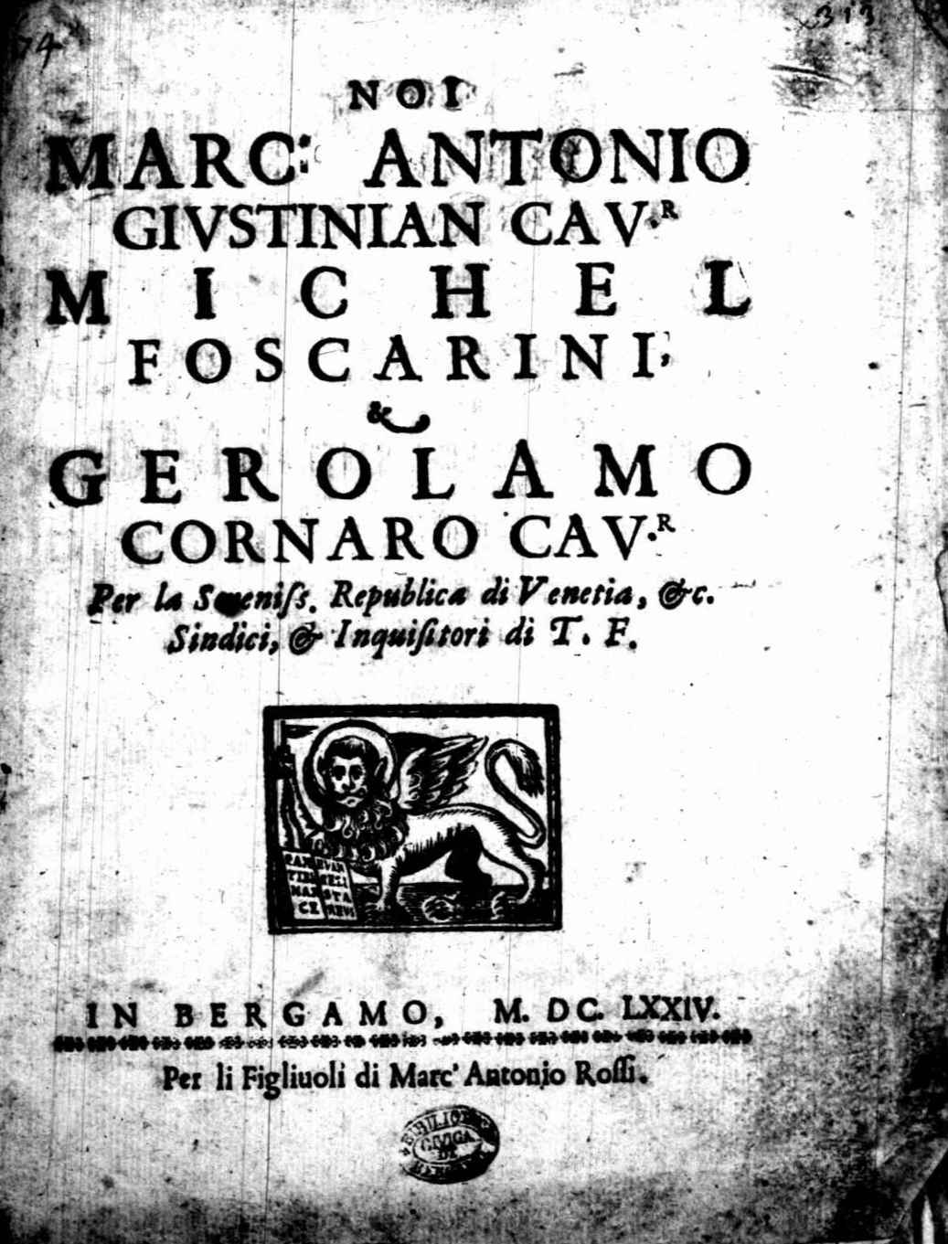 Frontespizio